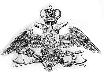 Эмблема инженерных войск Русской императорской армии